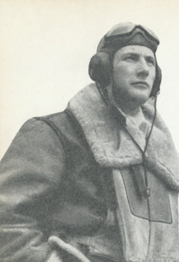 Oluf Bernhard Reed Olsen fløy Northrop N-3PB ved 330 skvadron på Island 1941-42 før han ble fallskjermjeger/agent.